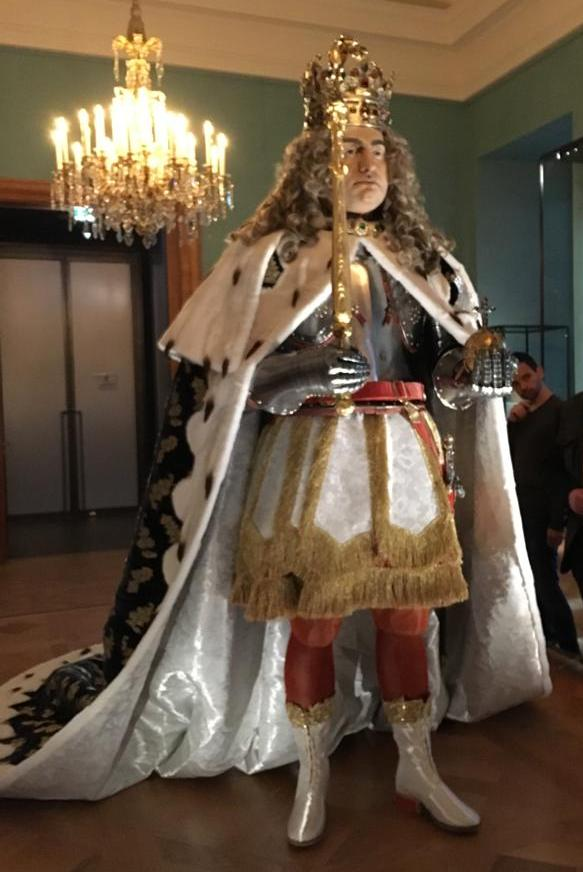 Restaurierung der Kopie des Krönungsmantels von August dem Starken. Anlässlich der Sonderausstellung des Historischen Museums der Staatlichen Kunstsammlungen Dresden - "Kurfürsten von Sachsen - Repräsentation in Bild und Rüstung" vom 31. August 1991 bis 13. Februar 1992 im Residenzschloss - durch die Textilrestaurierungswerkstatt am Stadtmuseum Dresden. Kürschnerarbeit durch Thomas Margenberg, Pelzhaus Hempel, Meissen.